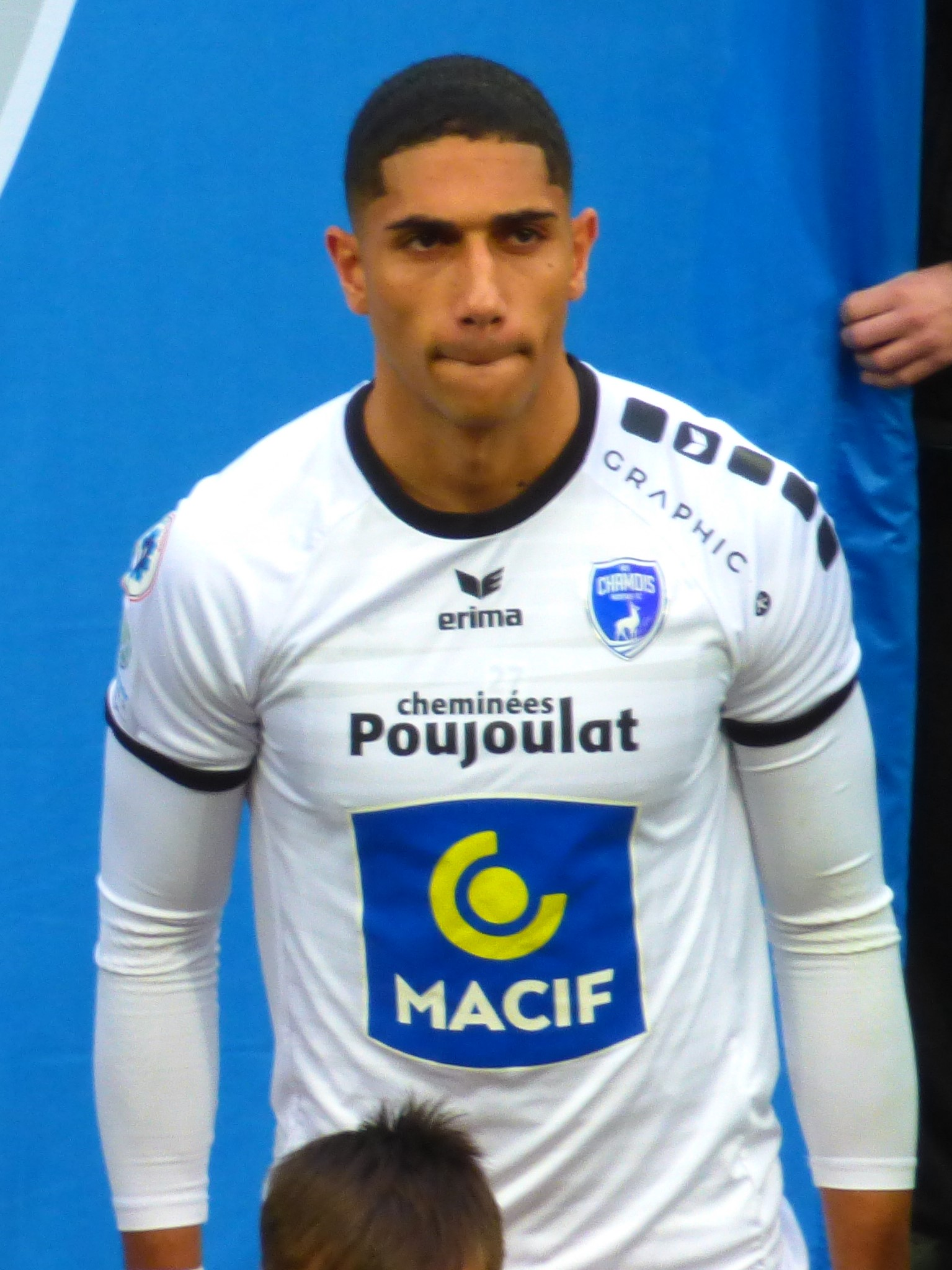 Bryan Passi avant le match Lens / Niort, le 21 décembre 2019, comptant pour la dix-neuvième journée du championnat de France de football de Ligue 2 2019-2020.